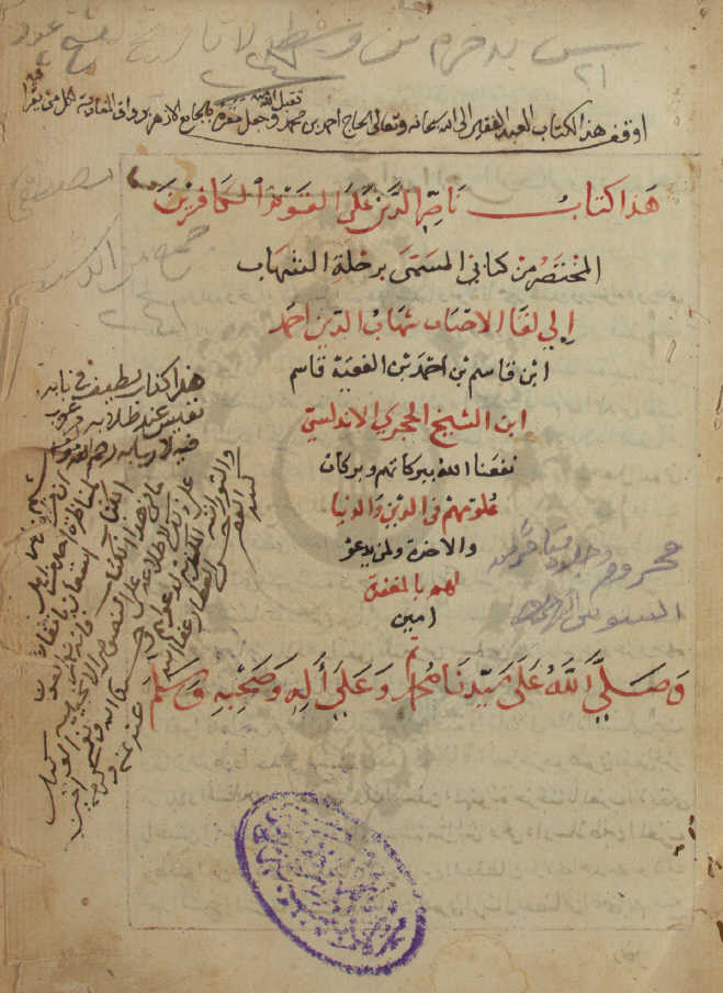 مخطوطة ناصر الدين على القوم الكافرين - مختصر من كتاب رحلة الشهاب إلى لقاء الأحباب لابن الحجري المتوفى نحو ١١٥٠ هـ